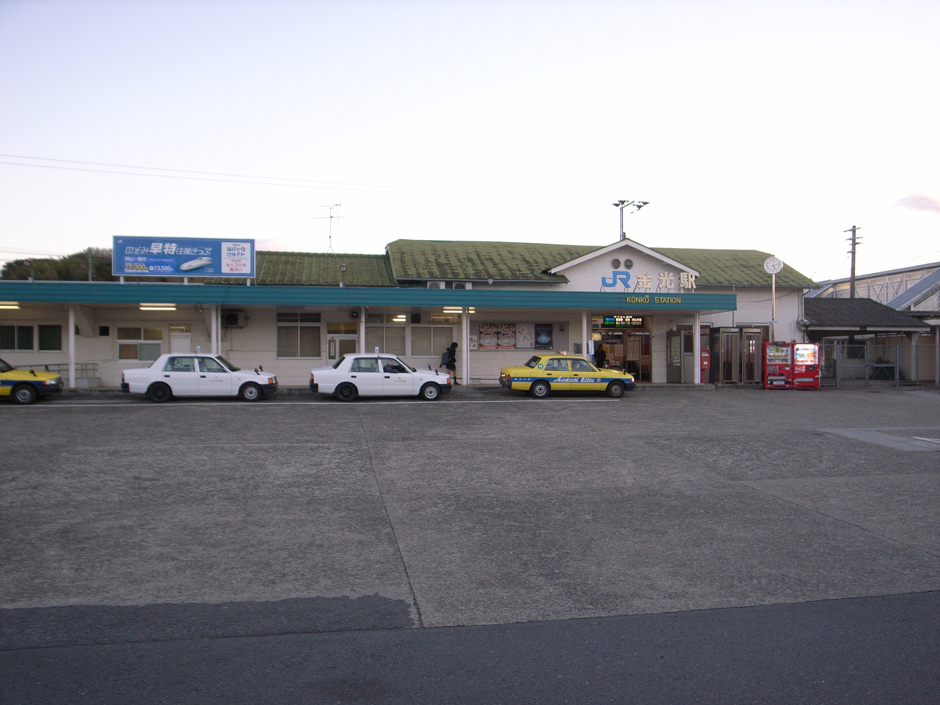 山陽本線金光駅 駅本屋